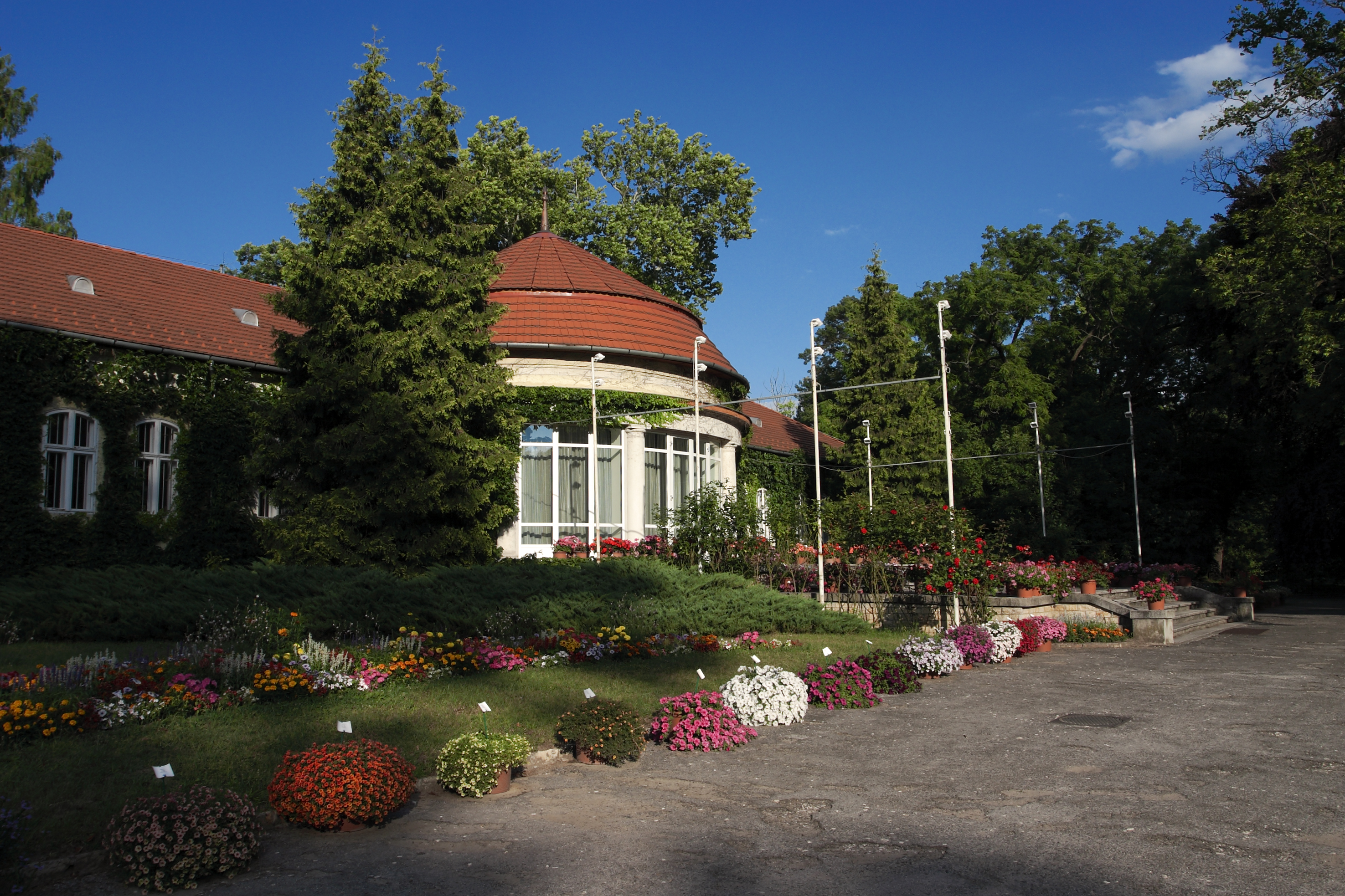 Botanikus kert (Vácrátót, Alkotmány u. 2.) This is a photo of a monument in Hungary. Identifier: 15084